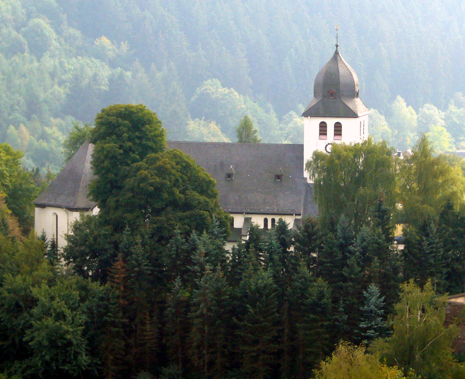 Pfarrkirche St. Nikolaus in Daun